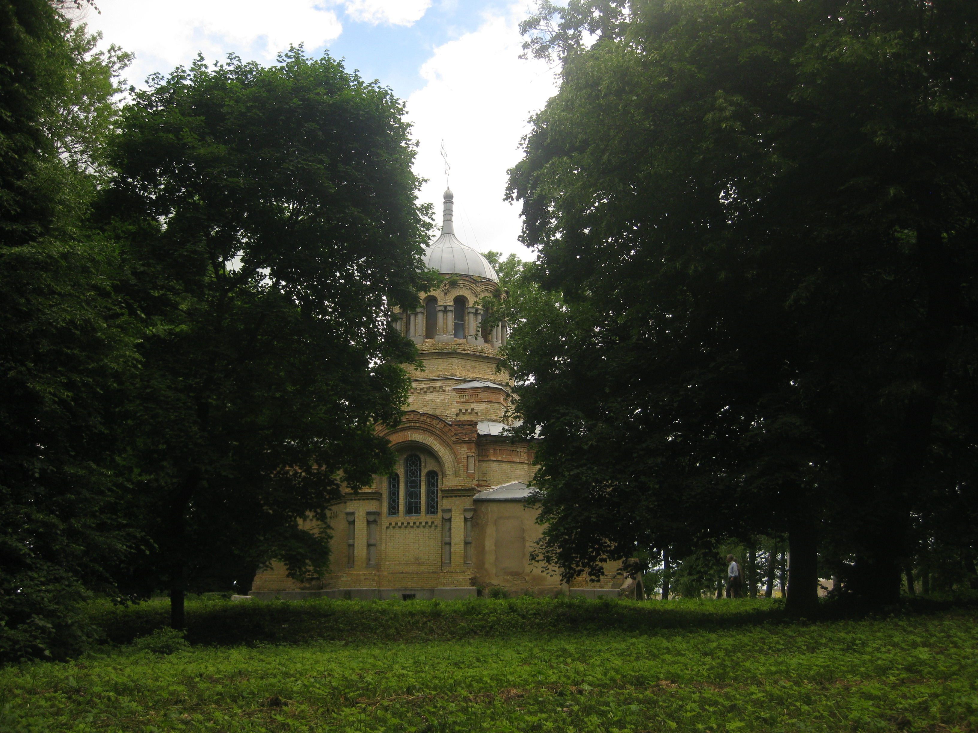 Парк, с.Нова Чортория